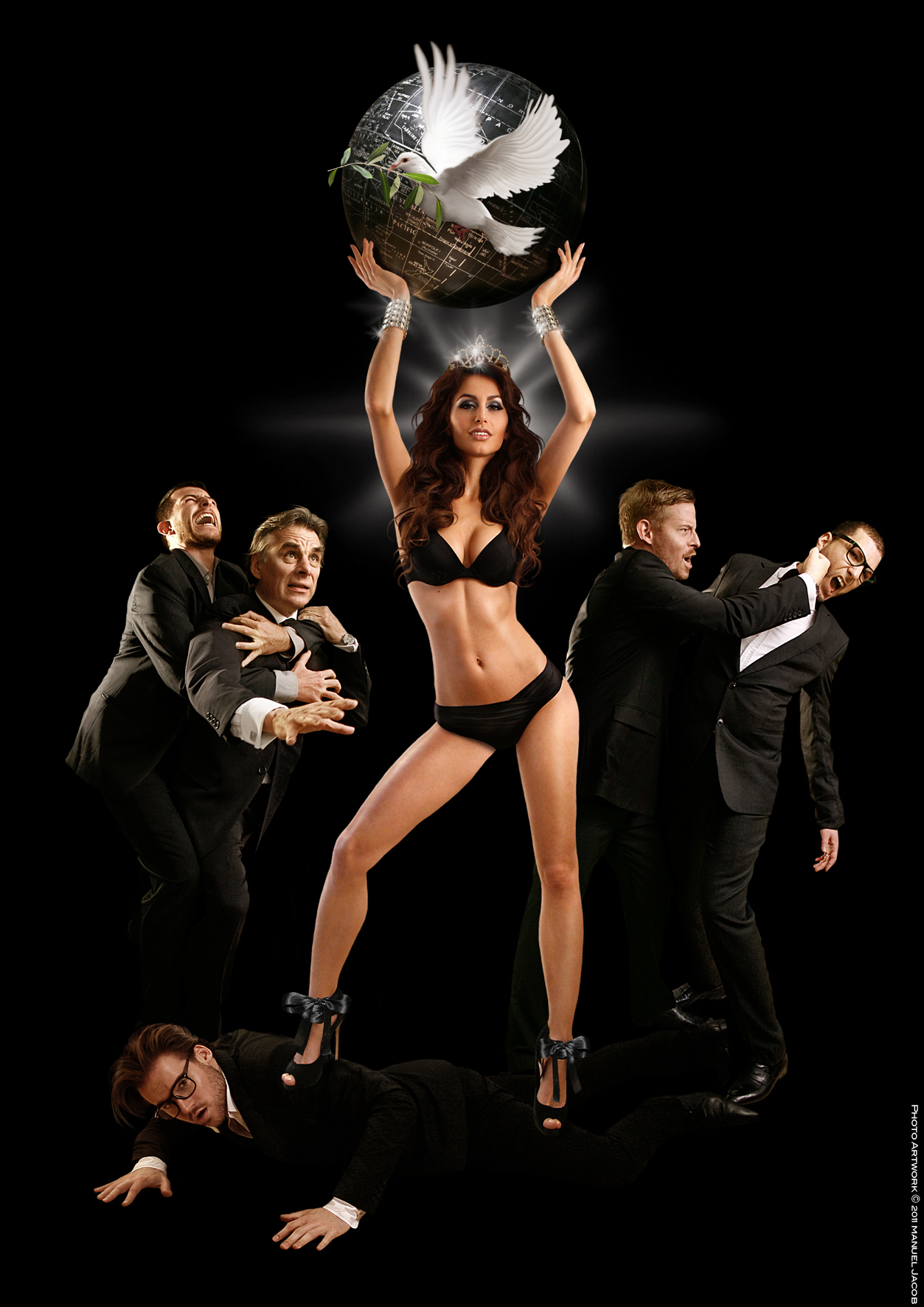 Kollaboration von Miss Universe Germany Kristiana Rohder, VOX TOP-CUT Moderator Santino Primavera mit seinem Verlobten Elmo Monaco, Geschäftsführer von Chocolaterie L'Amour Du Chocolat Nico Breuer, Jürgen Freiherr von Bomsdorff und Hair&MakeUp Artistin Anja El Sawaf. Inszeniert von Manuel Jacob.